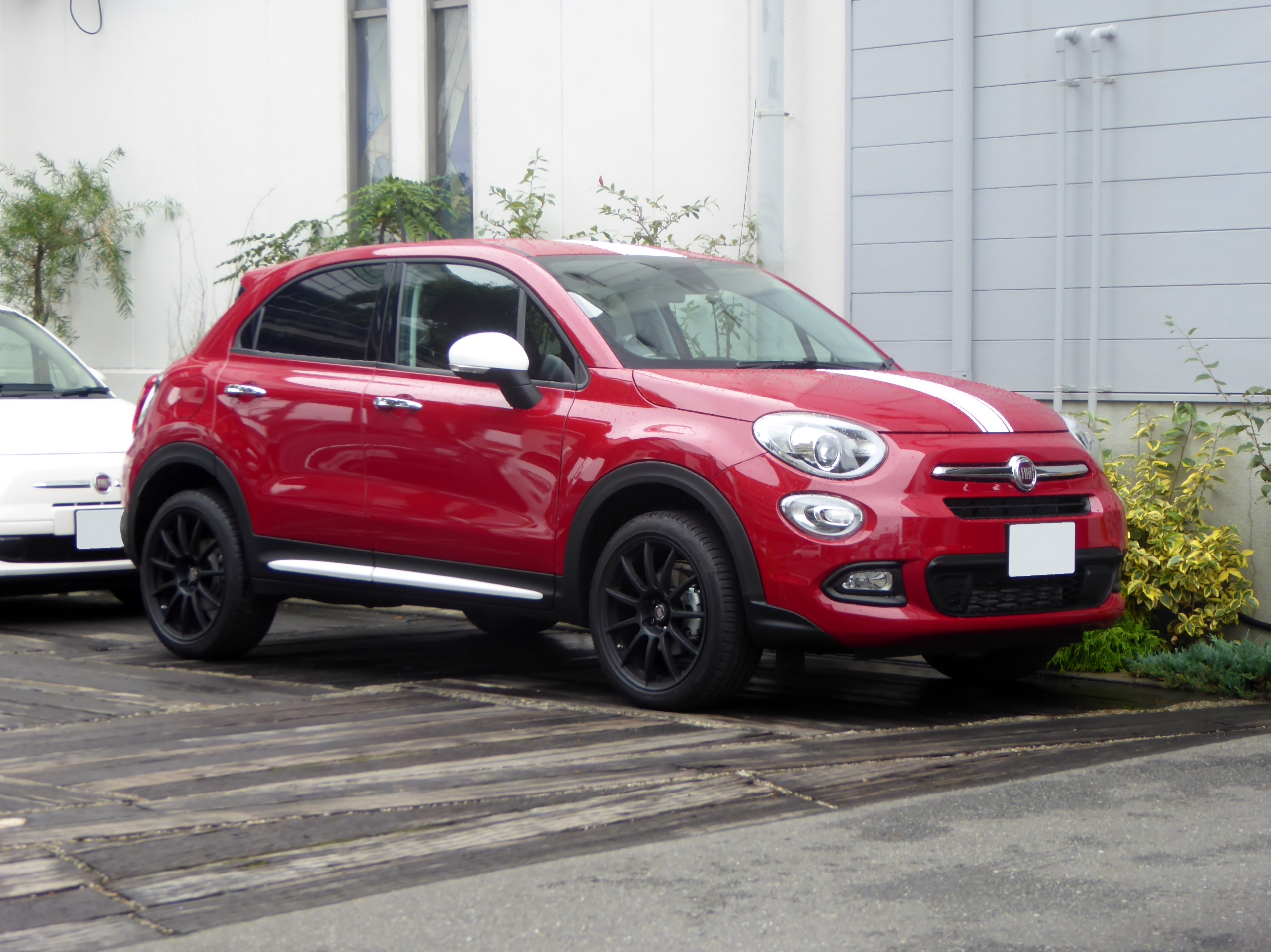 ABA-33414型フィアット・500X Pop Star Plusをフロントから撮影。